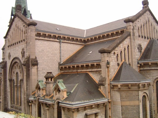 Vue de dessus de l'angle arrière de l'église Notre Dame à Aix-les-Bains en Savoie.